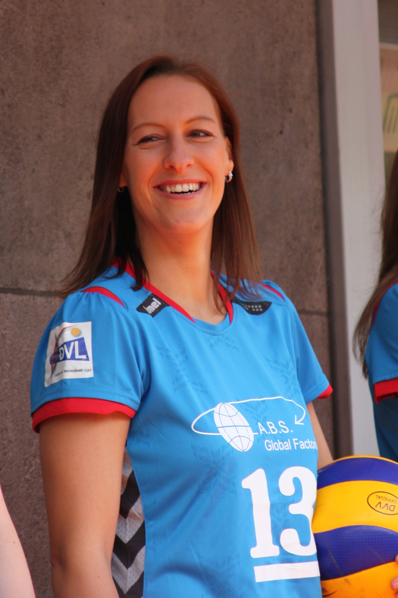 Wiesbadener Stadtfest 2013: Regina Burchardt, Spielerin der Bundesliegamanschaft des VC Wiesbaden